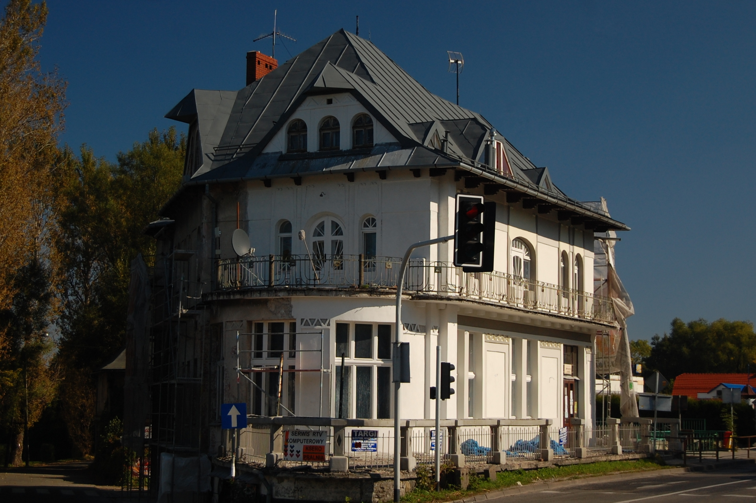 Česky: Kulturní dům ve Wapienici (Bielsko-Biała, Polsko)